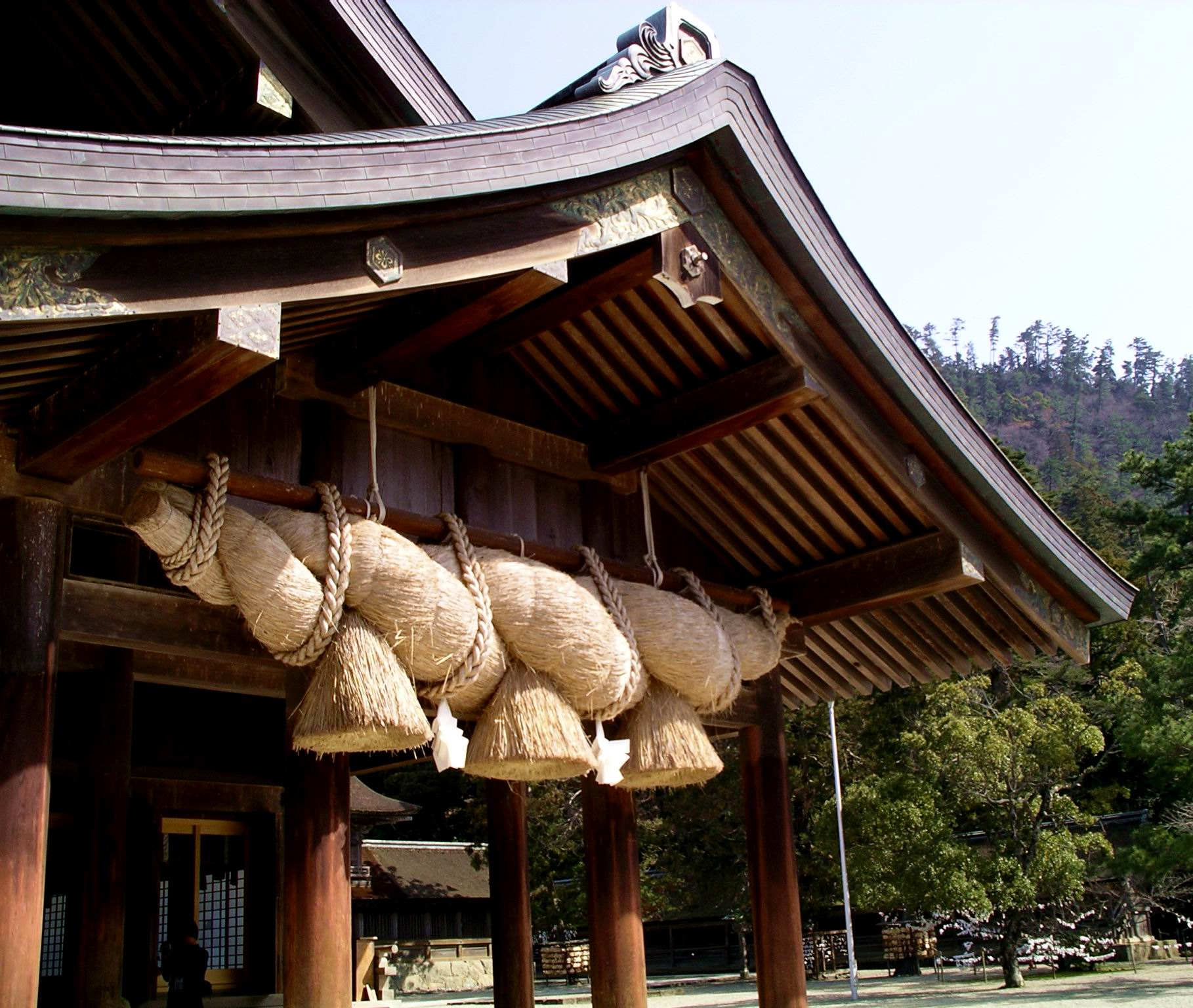 Izumo Taisha, Shimane.